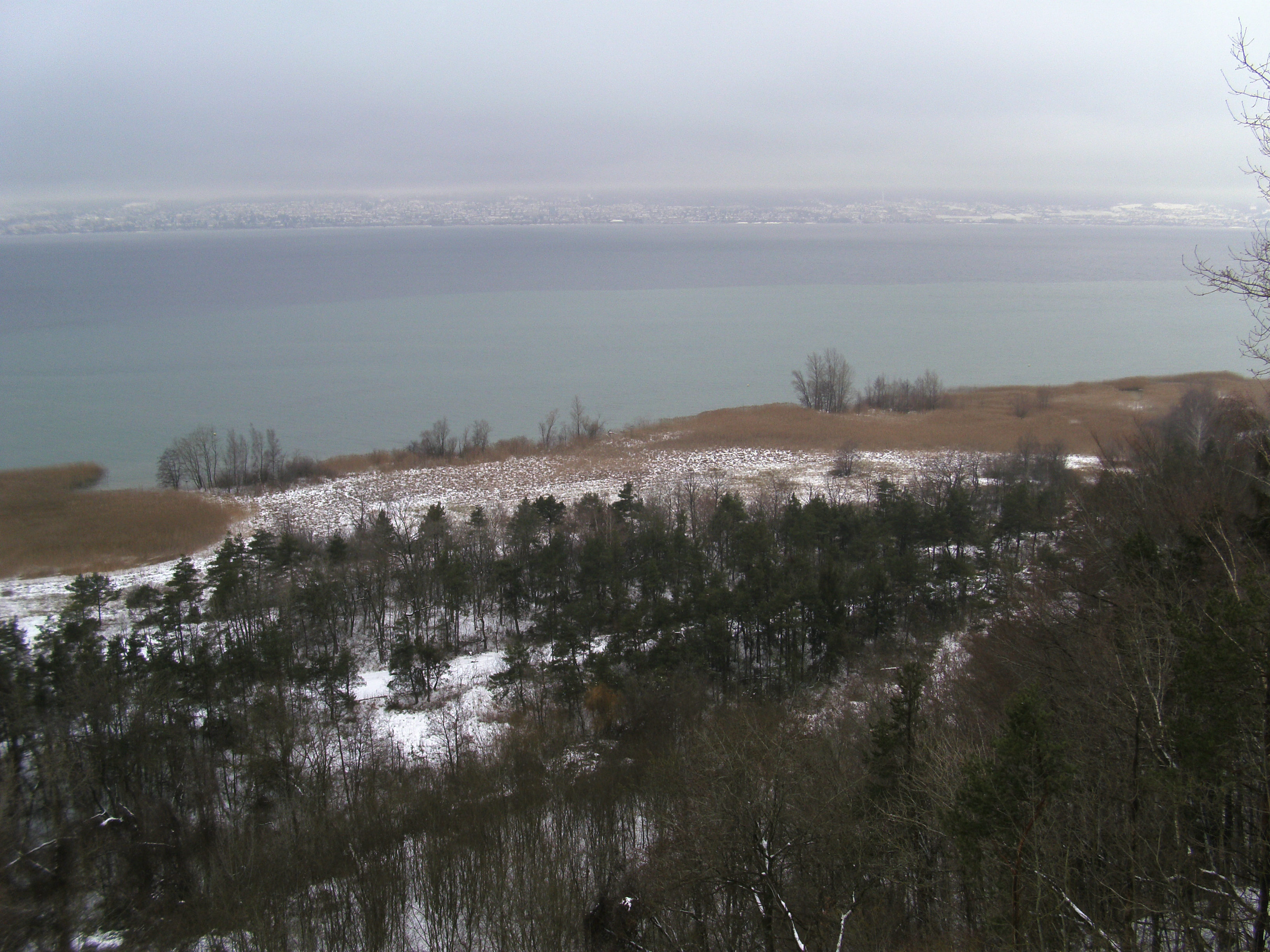 Chabrey, la Grande Cariçaie et au fond Neuchâtel